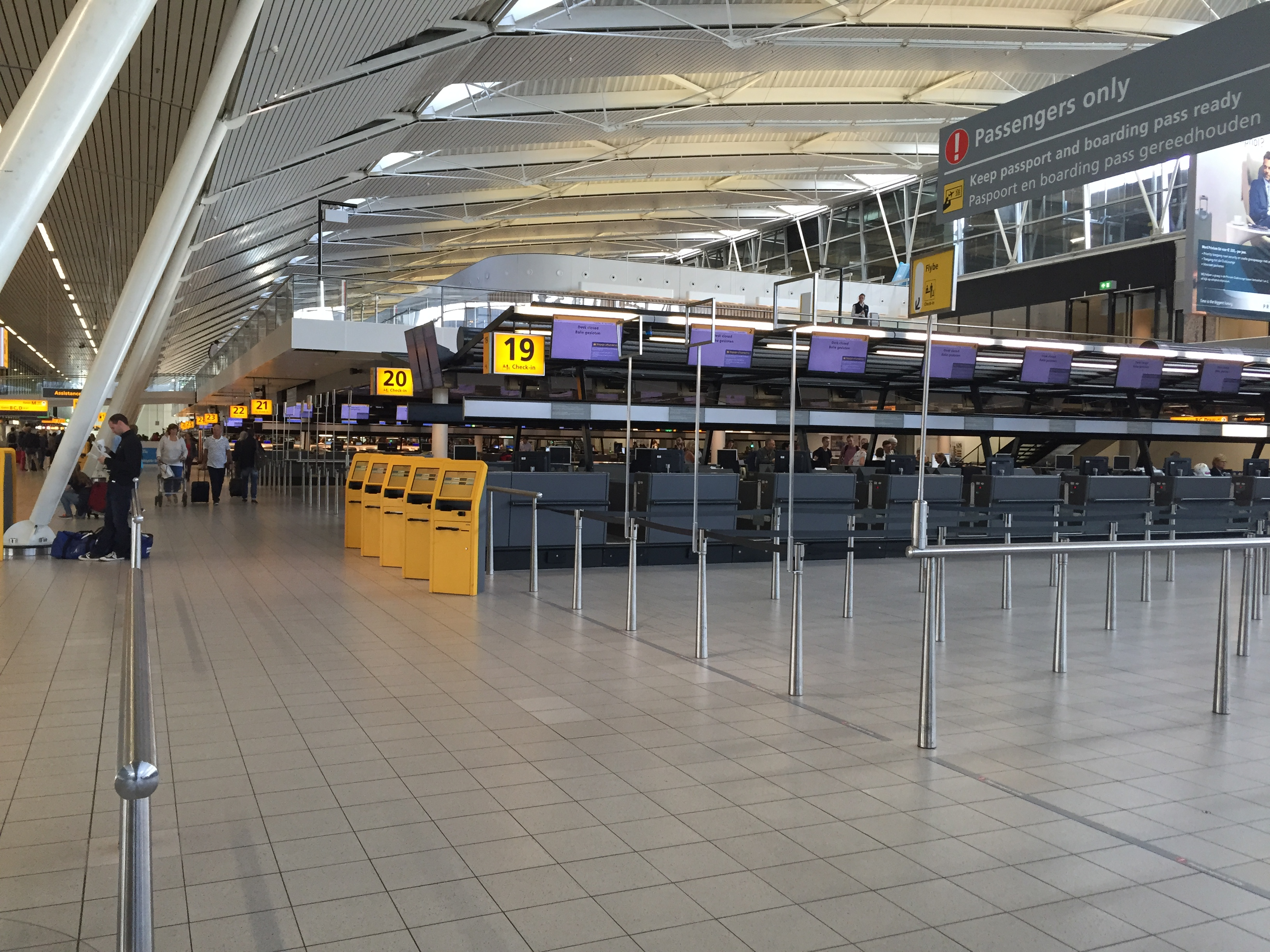 Mostradores de documentación del Aeropuerto Internacional de Ámsterdam.